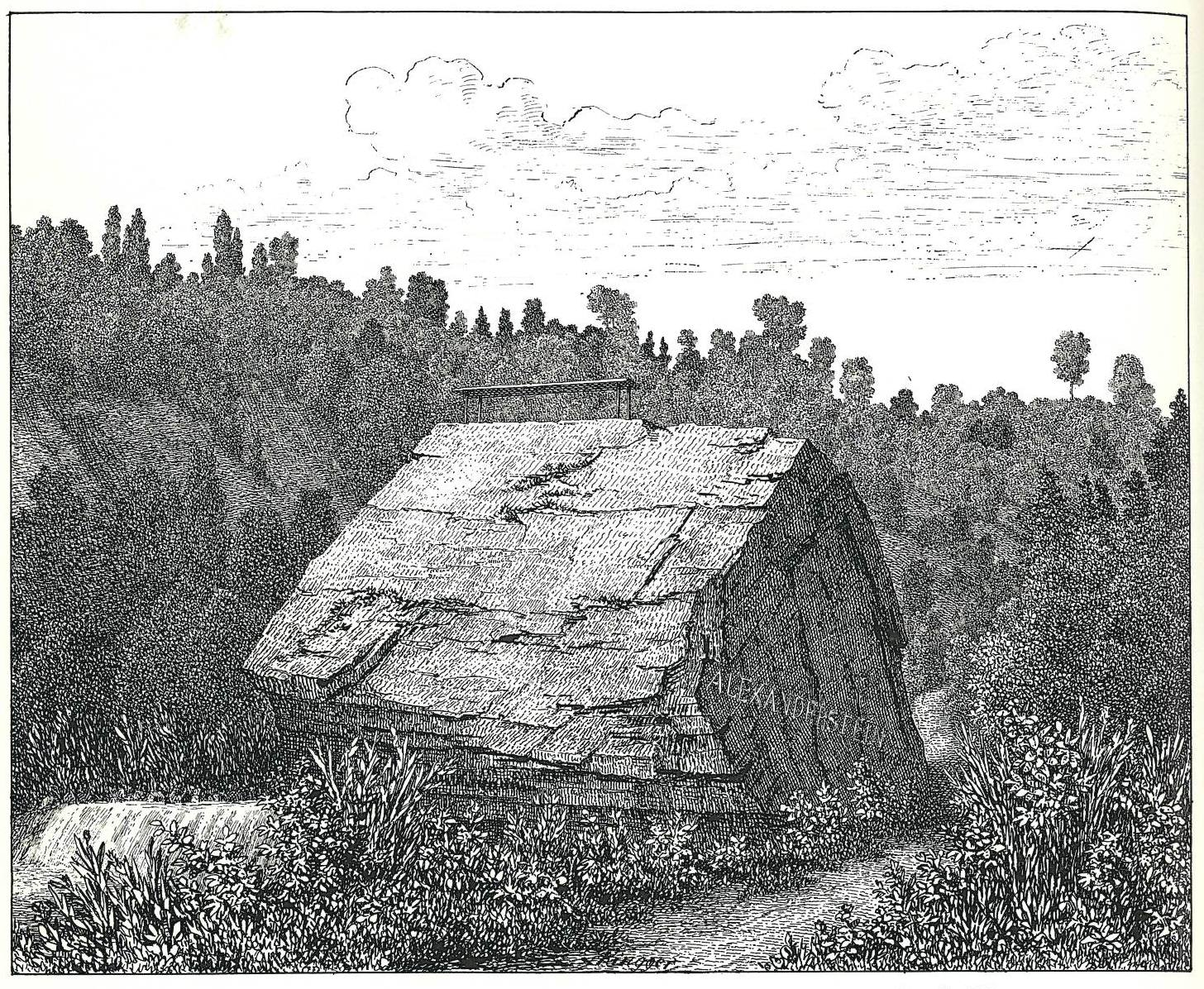 Alexanderstein im Küsnachter Tobel, benannt nach Alexander Wettstein, Zeichnung von Rudolf Ringer